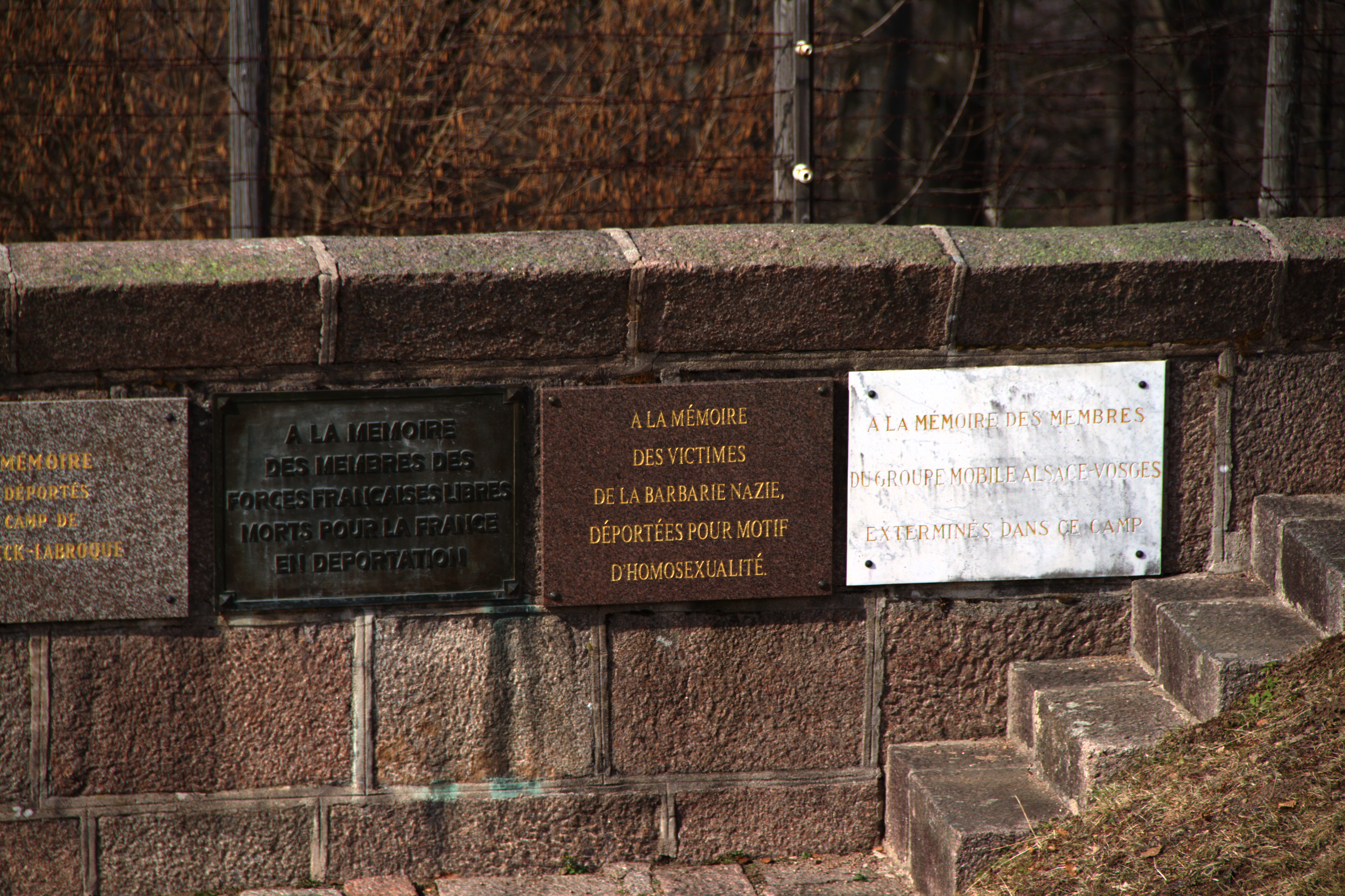 Camp de concentration de Natzwiller-Struthof. Plaques mémorielles.